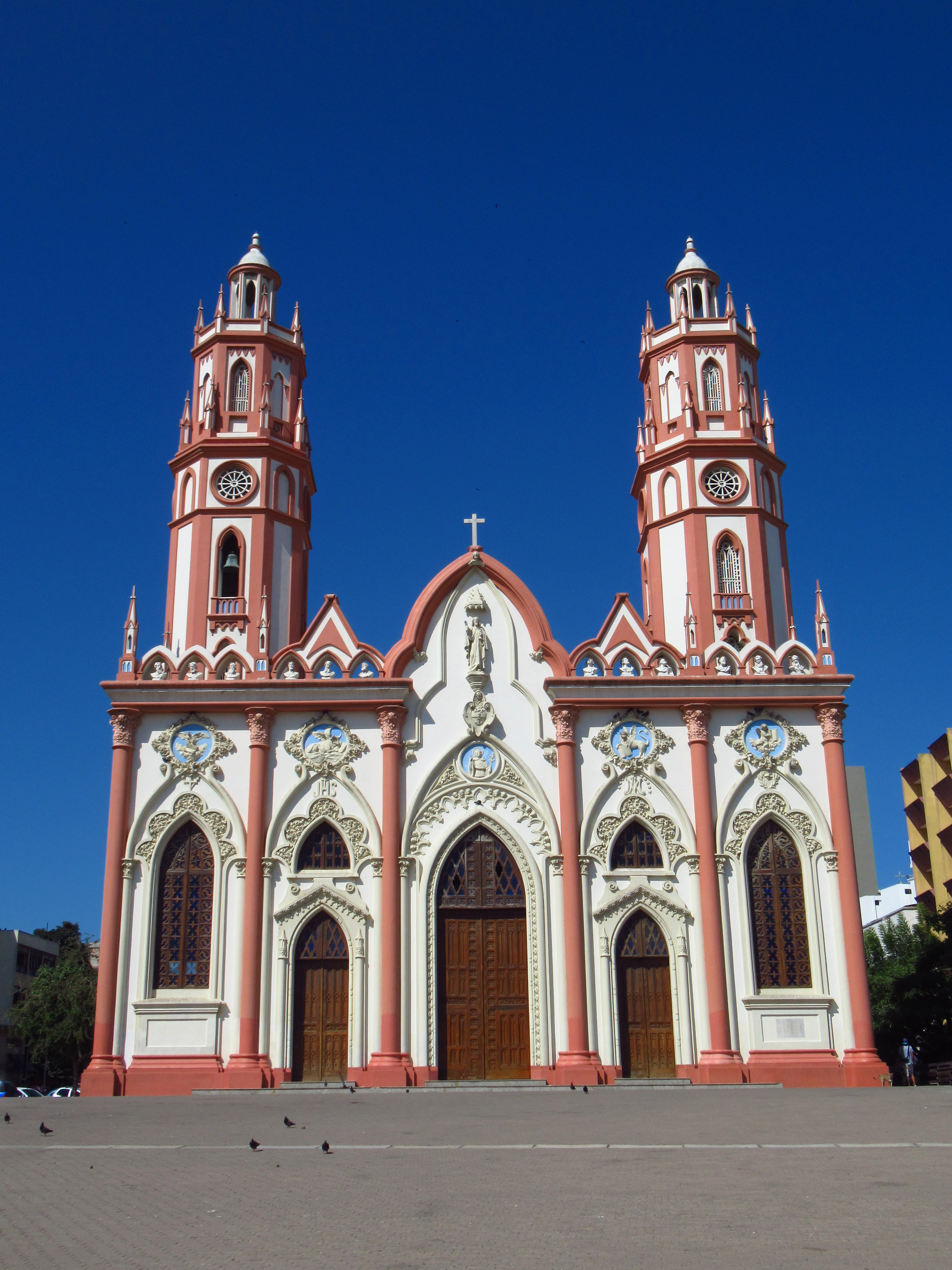 2020 Barranquilla - Iglesia de San Nicolas de Tolentino (Barranquilla).